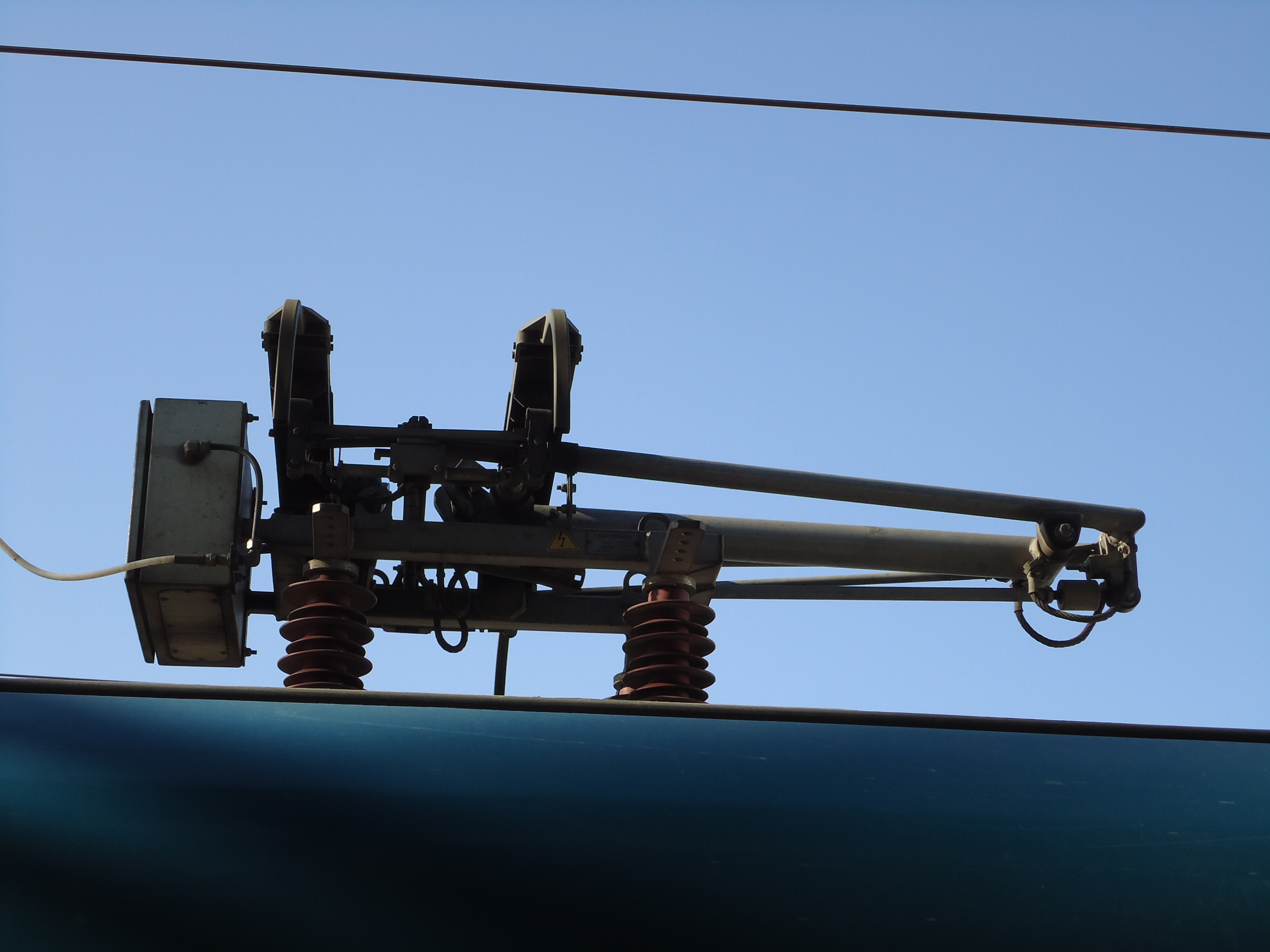 누리로에서 쓰이고 있는 싱글암 팬터그래프 접은 모습